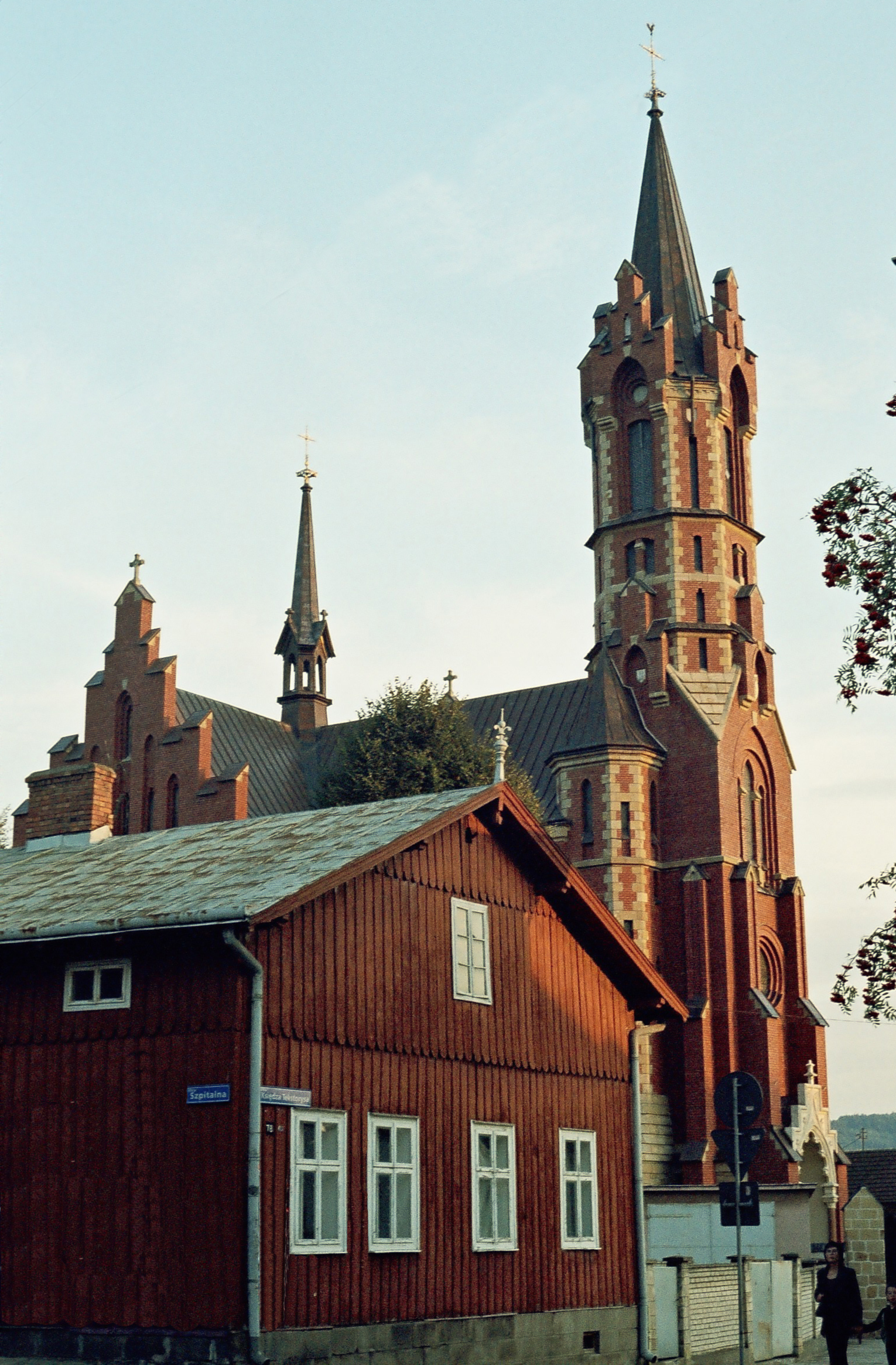 Kościół w Kołaczycach